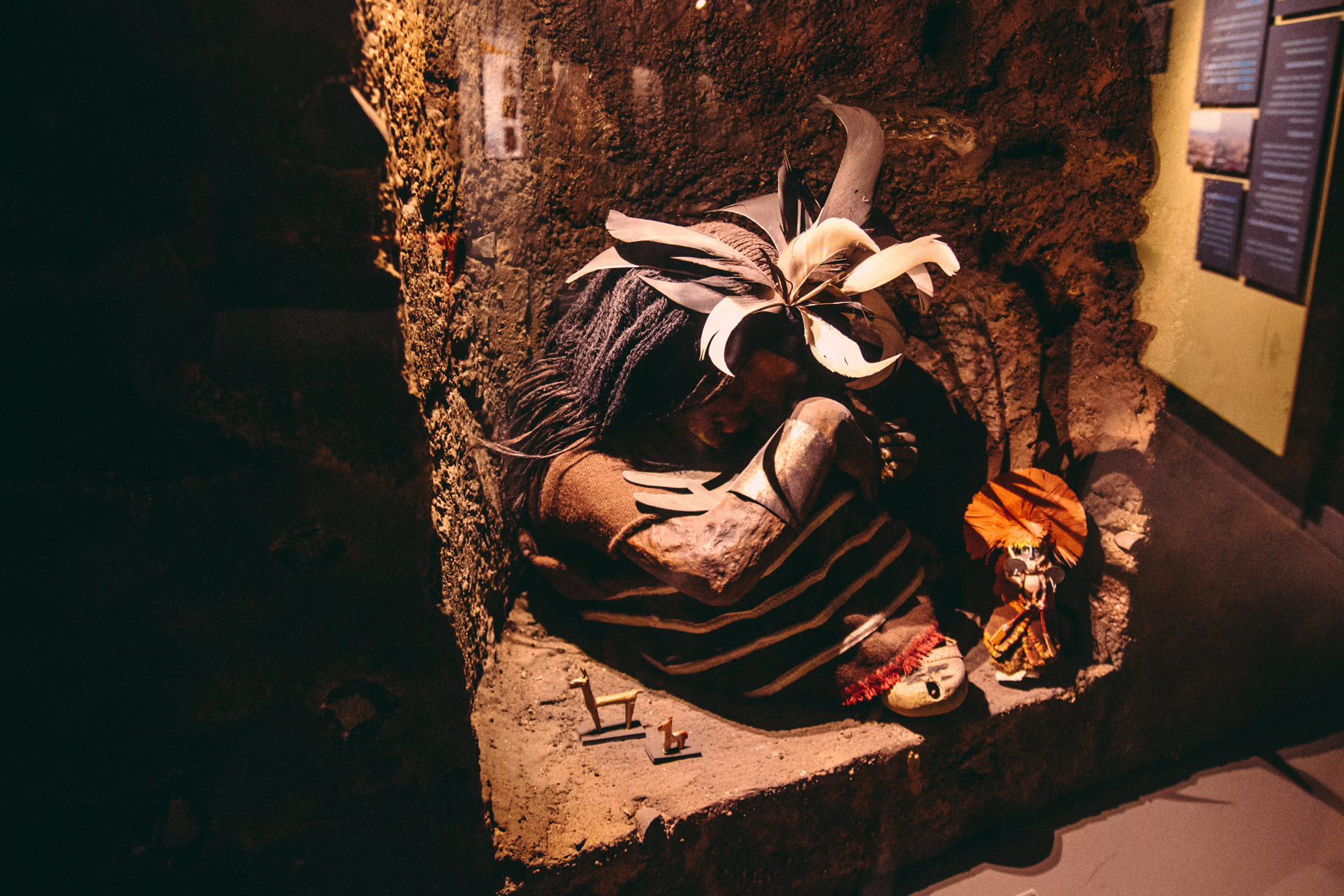 Exposición Chile Biogeográfico. Museo Nacional de Historia Natural, Santiago, Chile El cuerpo congelado del niño del cerro El Plomo es el primer descubrimiento de esta clase en Chile y desde su hallazgo en 1954. Lo hizo el arriero Luis Gerardo Ríos y su sobrino, Jaime Ríos Abarca en un lugar del cerro El Plomo, ubicado a 5.200 metros de altura, conocido como “La Pirca de los Indios”. Se dice que “guardián” del Valle de Santiago. Ofrenda realizada por los incas en la frontera del Coyasuyu.